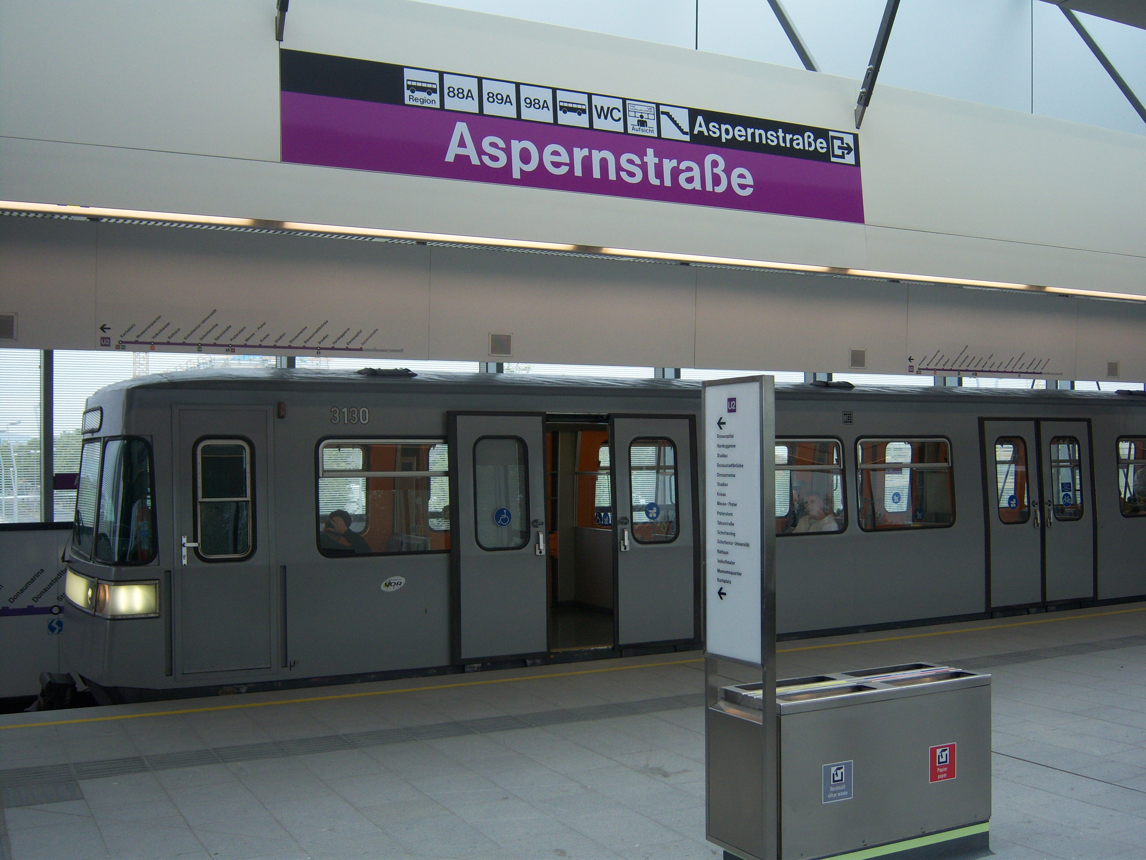 U2-Station Aspernstraße